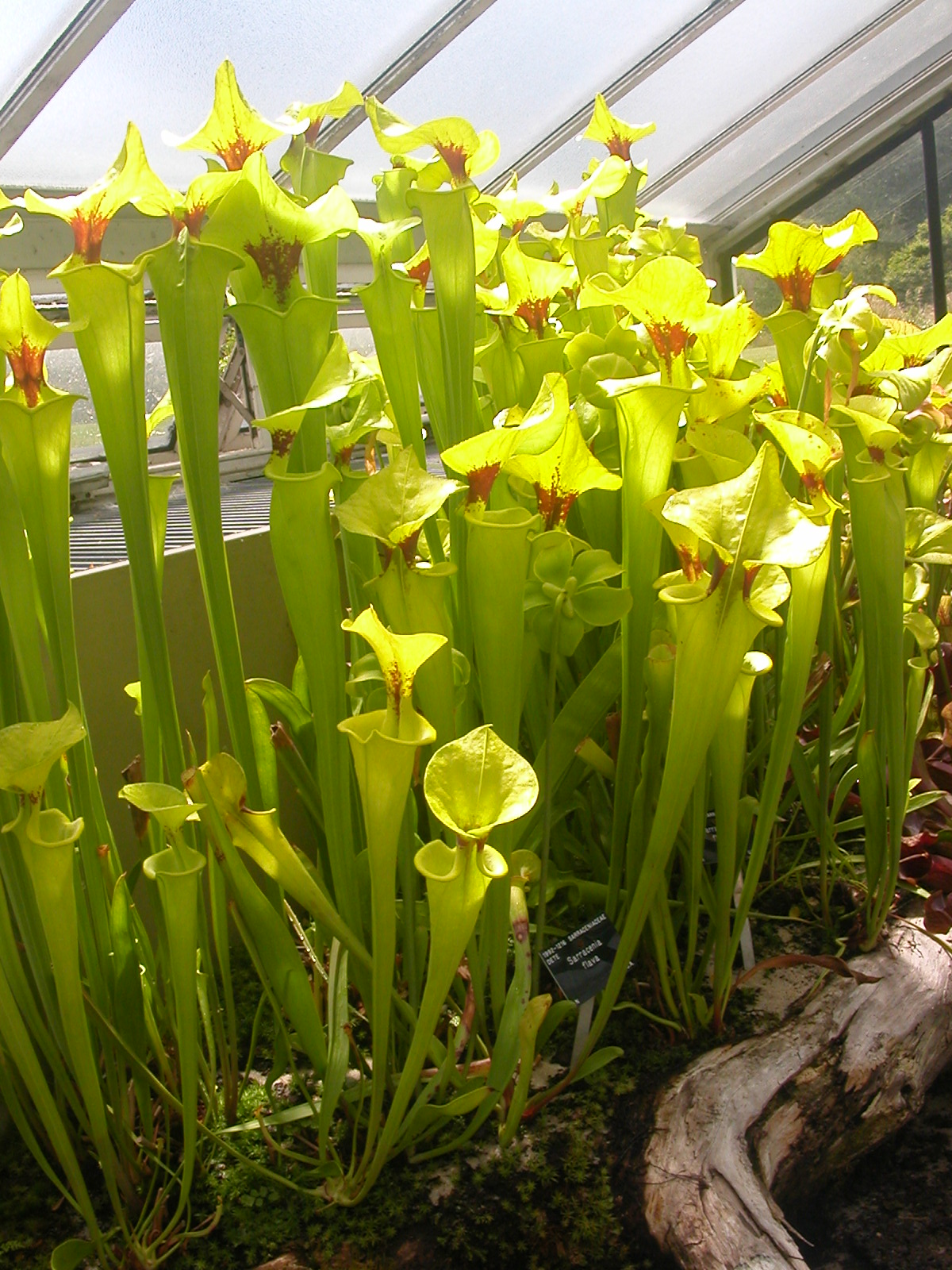 Kew Gardens - Sarracenia Flava